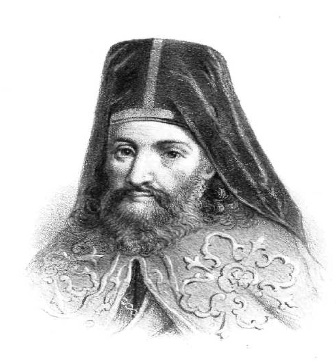 Griechischer Gelehrter und Theologe, 19. Jahrhundert